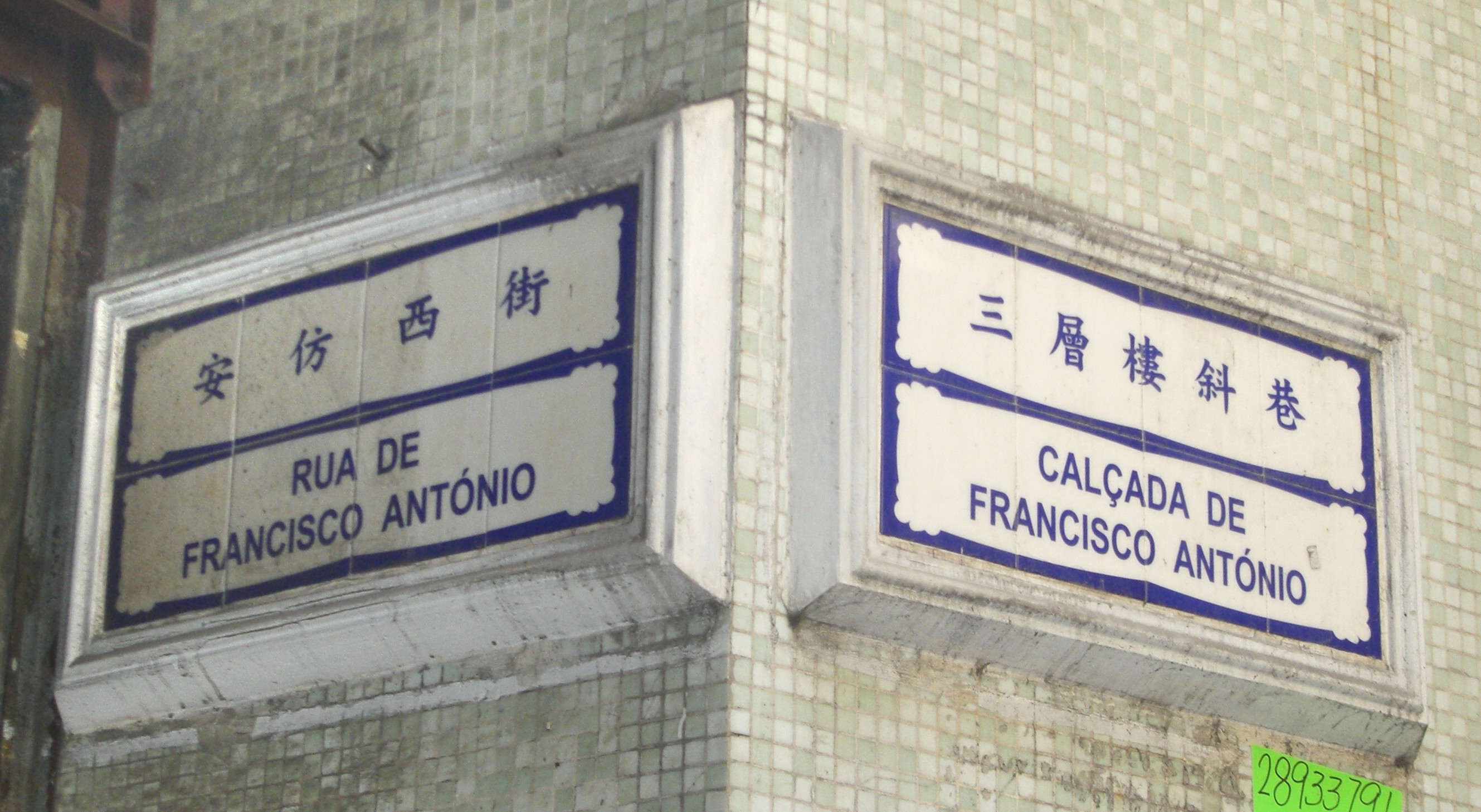 Rua e Calçada des Francisco António